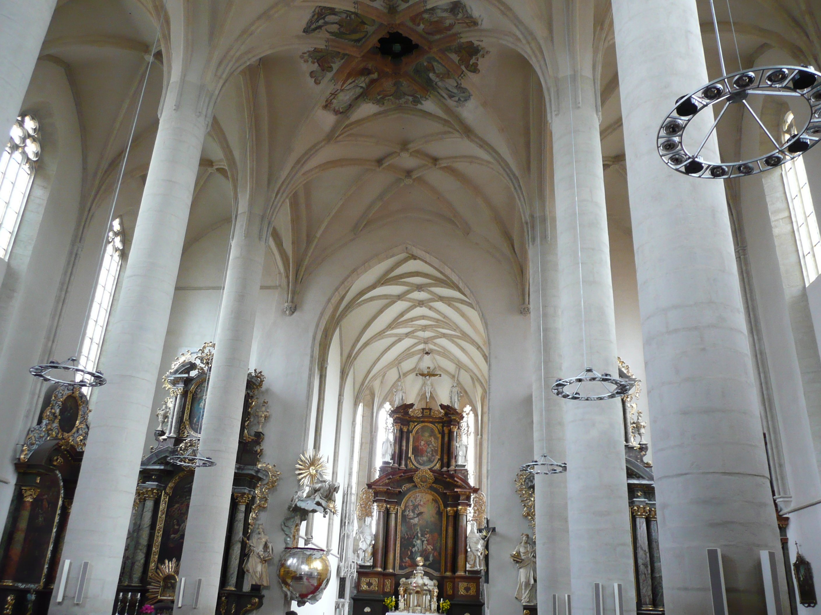 Kostel svatého Mikuláše (Znojmo), interiér trojlodí a presbytáře.